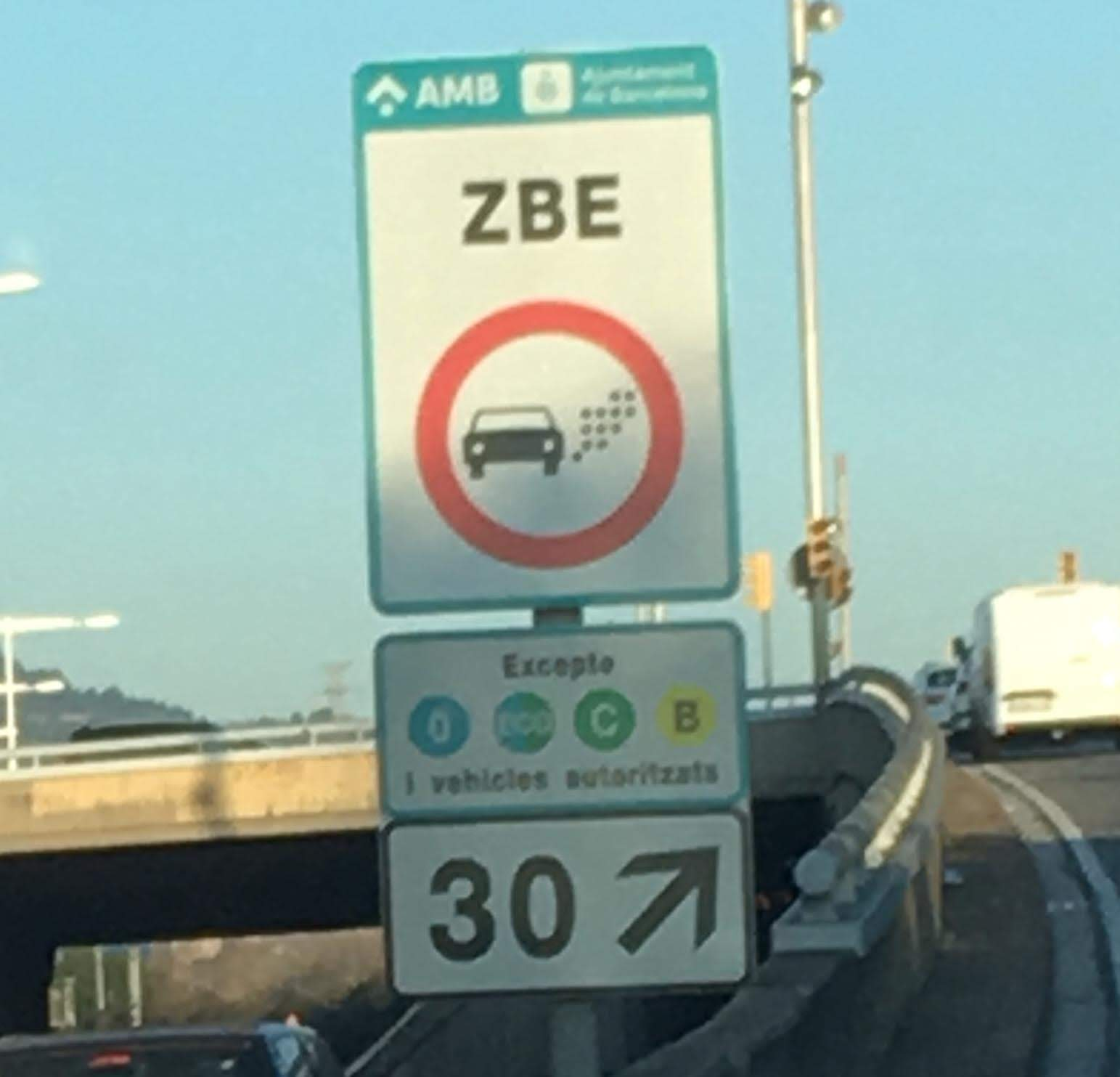 Rètol indicatiu de l'inici de la Zona de Baixes Emissions Rondes Barcelona, situat a la sortida 30 de la Ronda Litoral